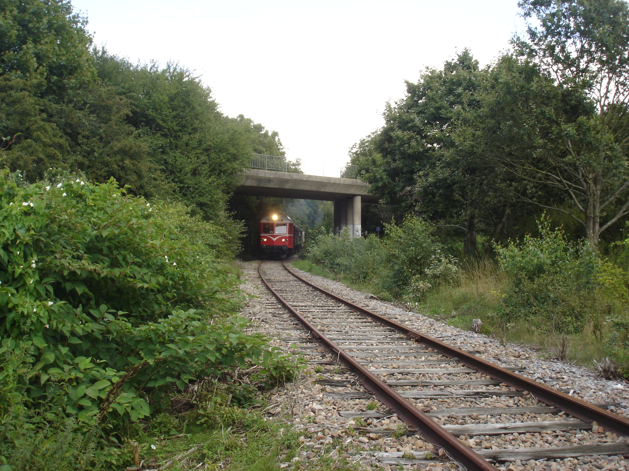 Haderslevbanen går under Ribevej i Vojens - veteranbanens tog kører gennem viadukten